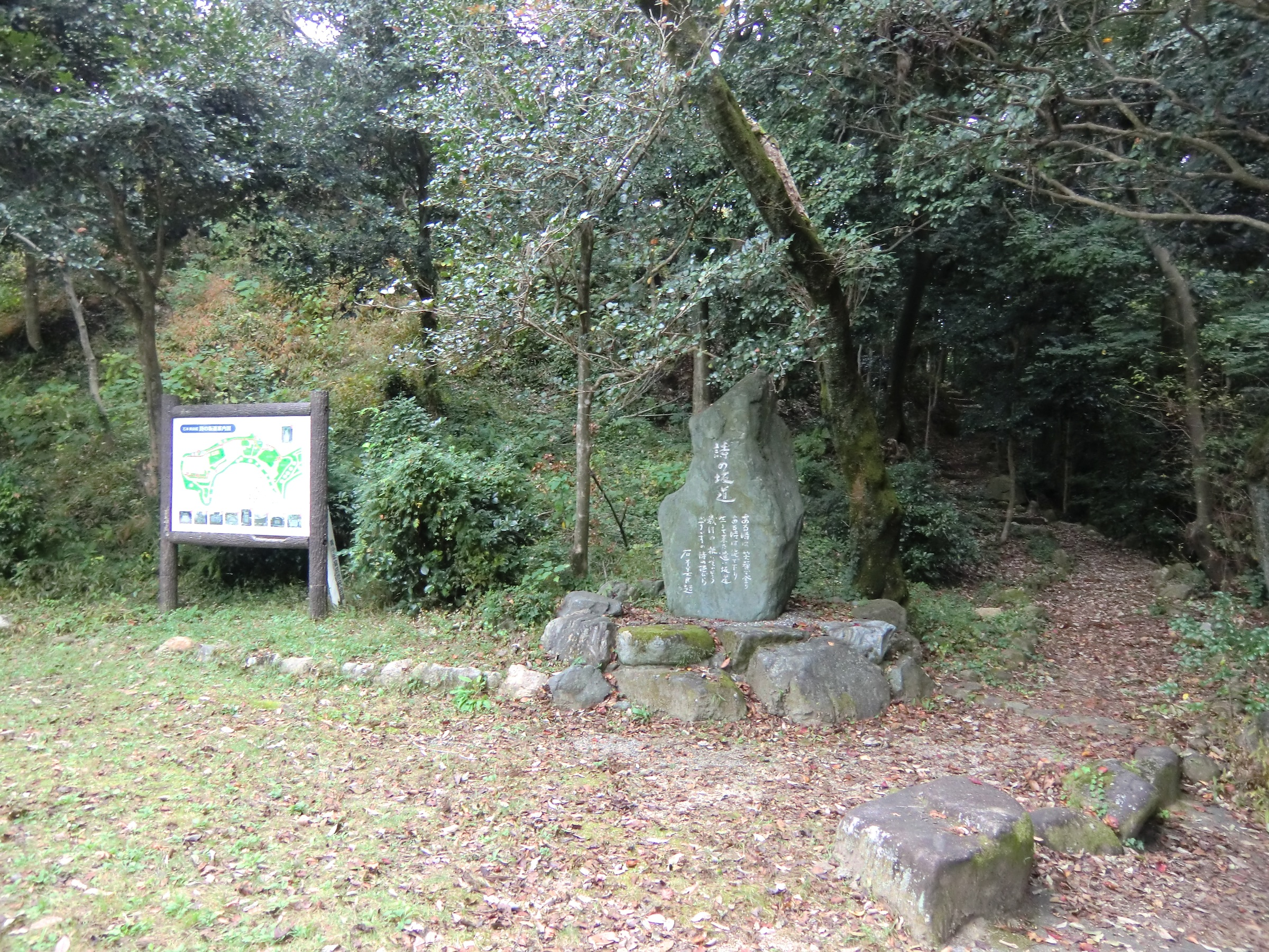 亀居城跡（亀居公園）の松の丸跡にある石本美由起の歌碑（大竹市）